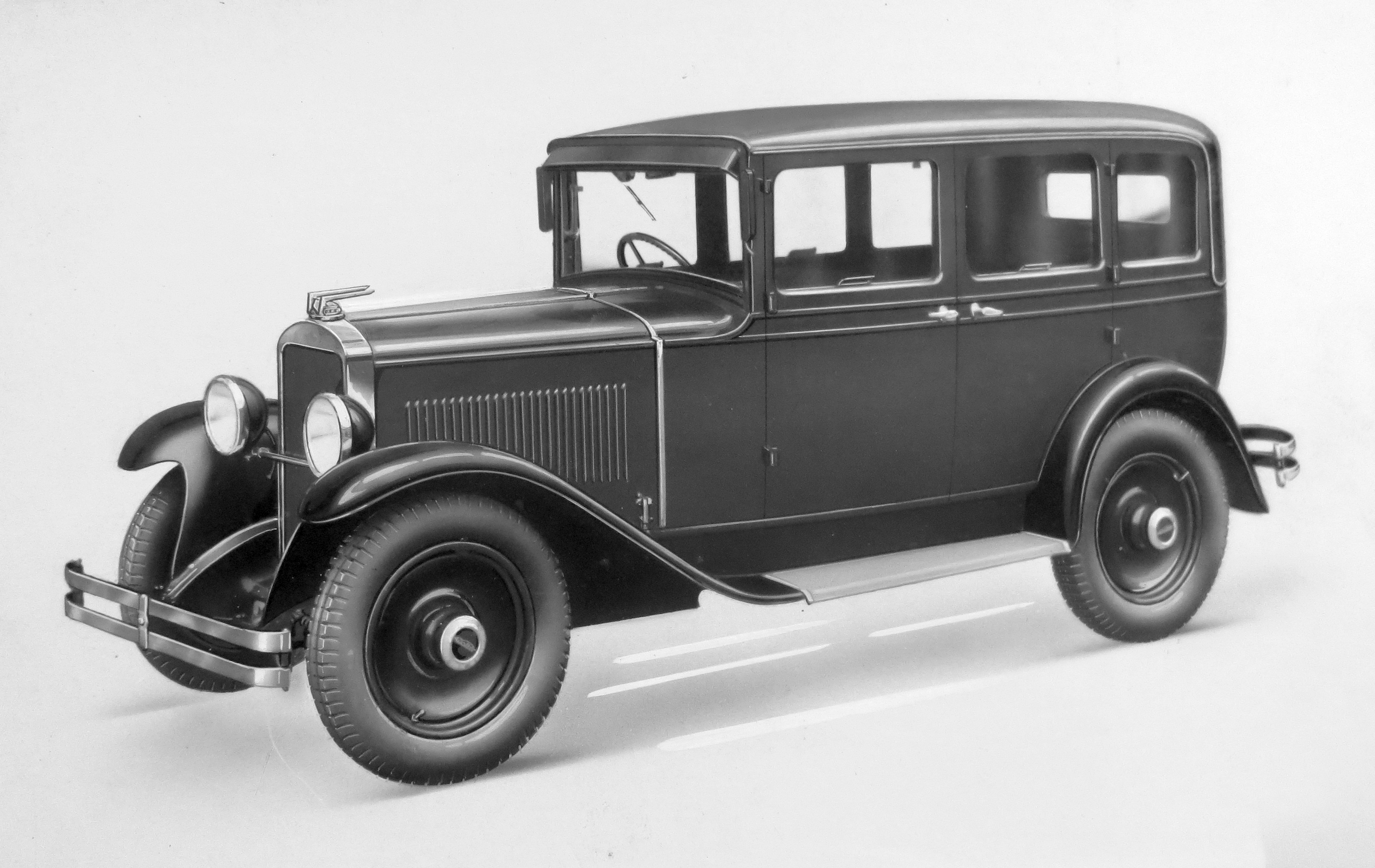 Walter Bijou (1931) sedan